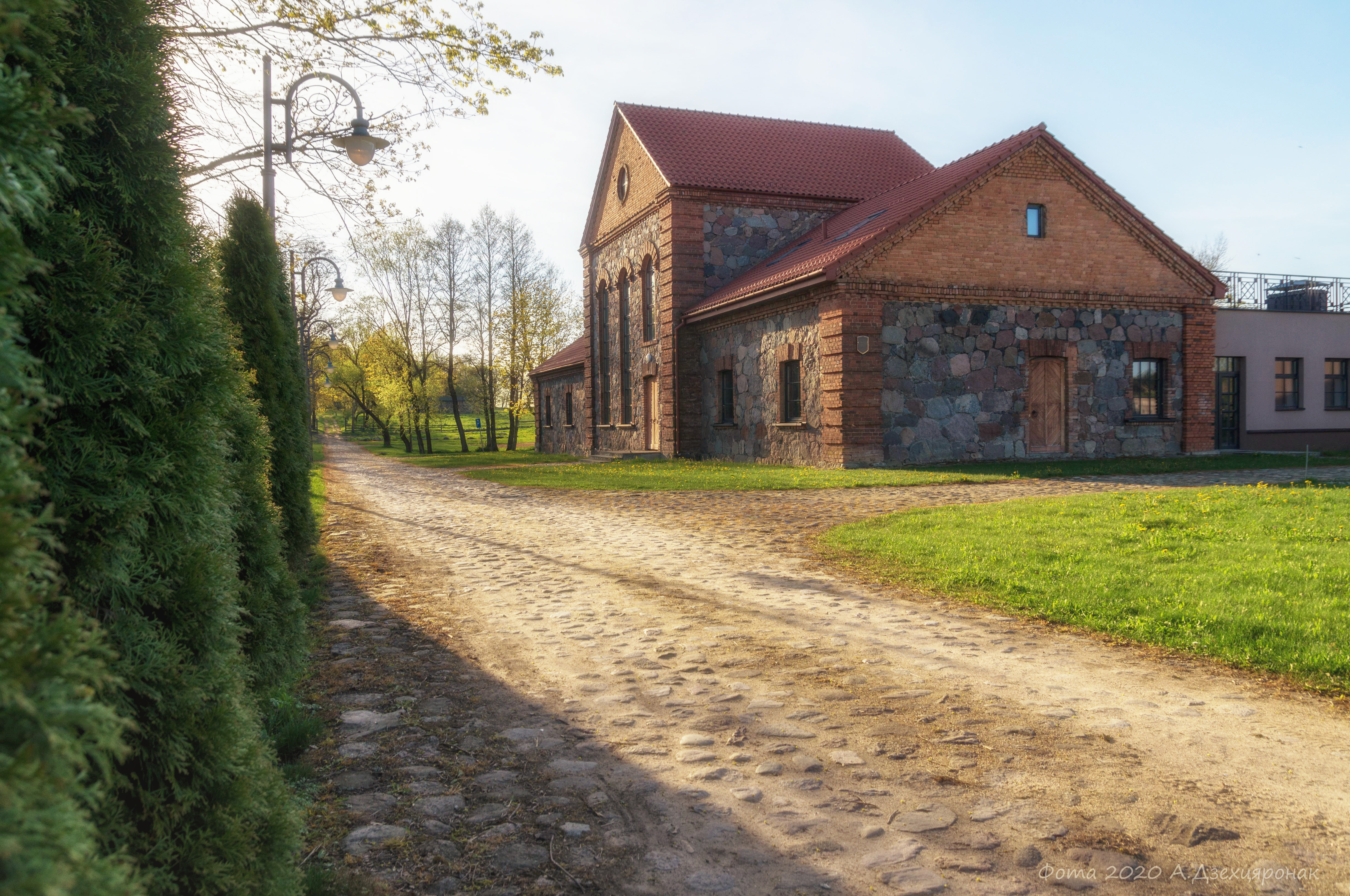 Сядзіба Бахдановічаў у Стайках